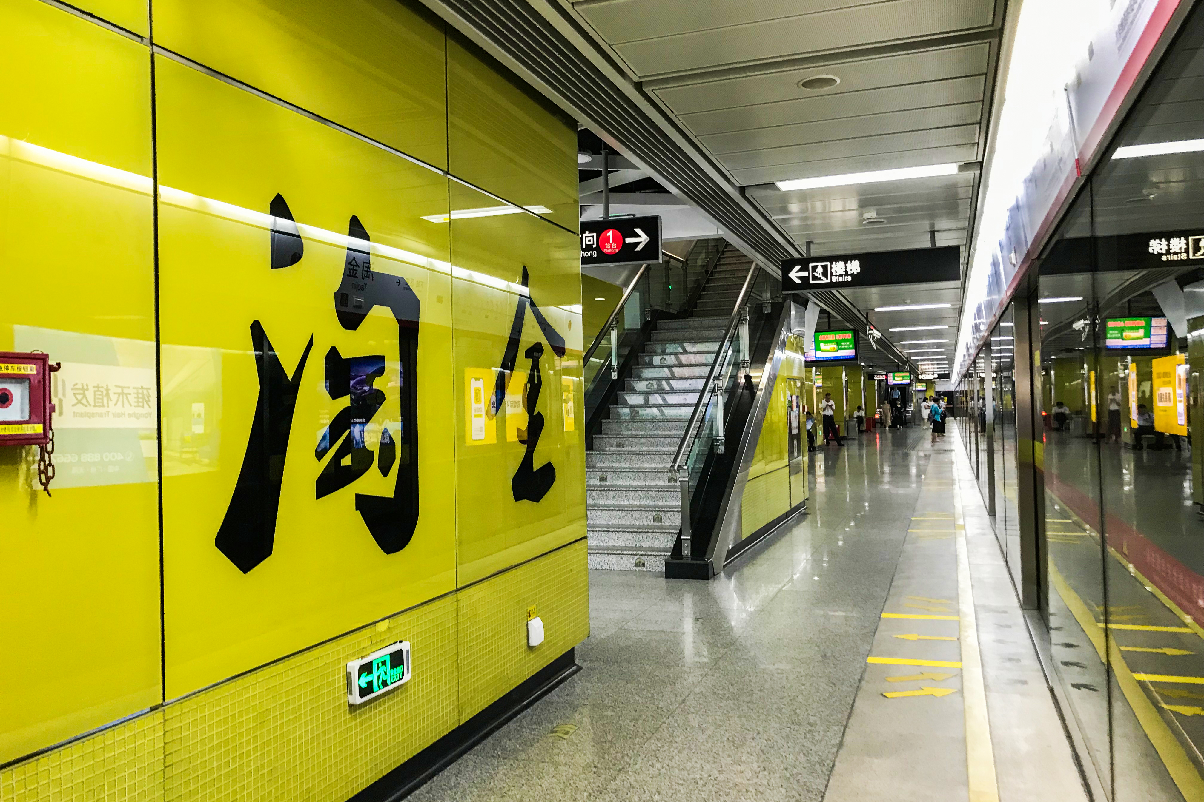 广州地铁淘金站